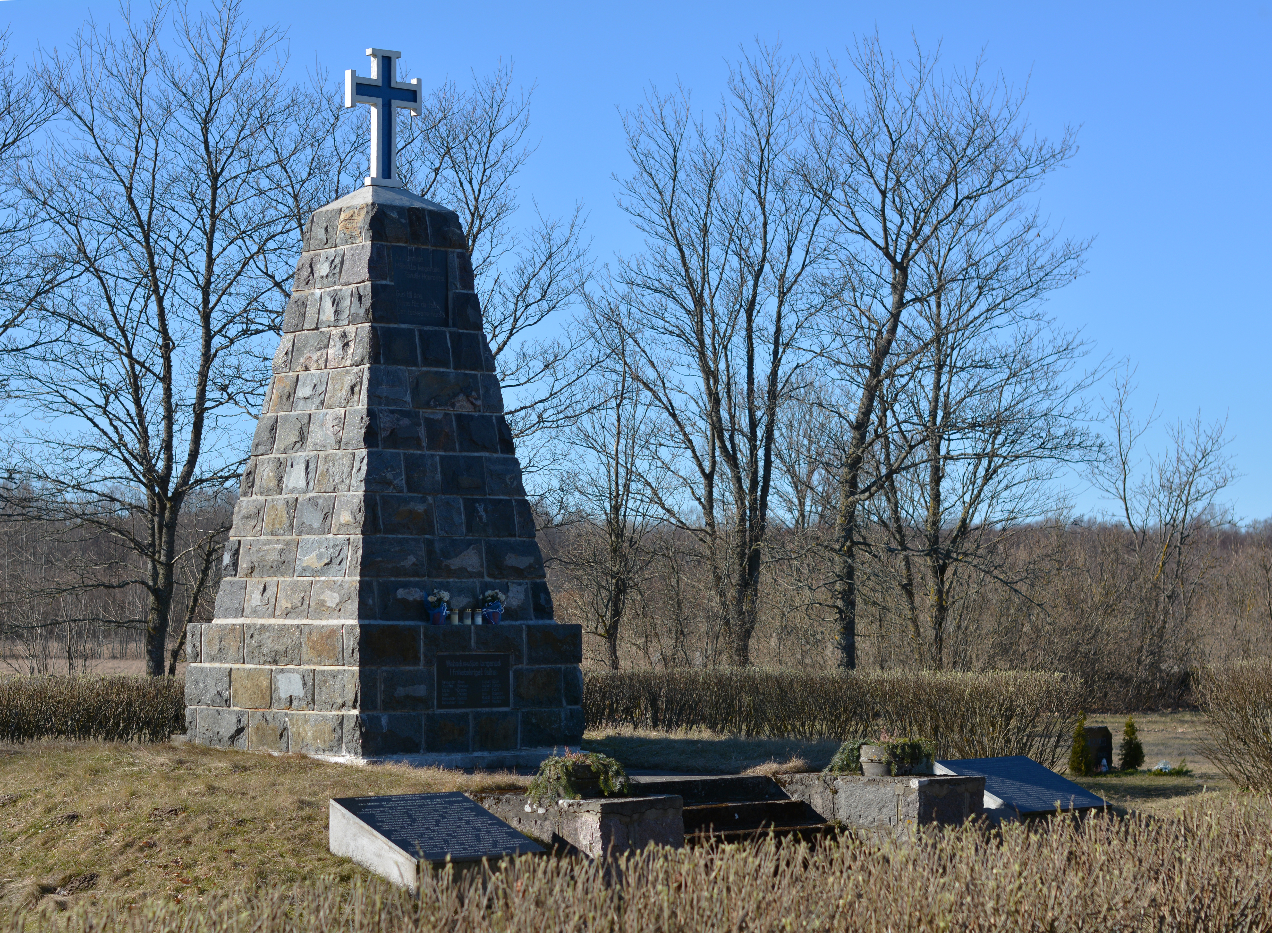 Noarootsi vald, Hosby küla. Mälestussammas taasavati 24.juunil 1990